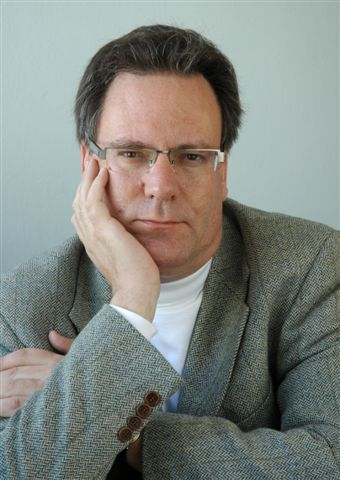 רפי וייכרט צילום: דינה גונה